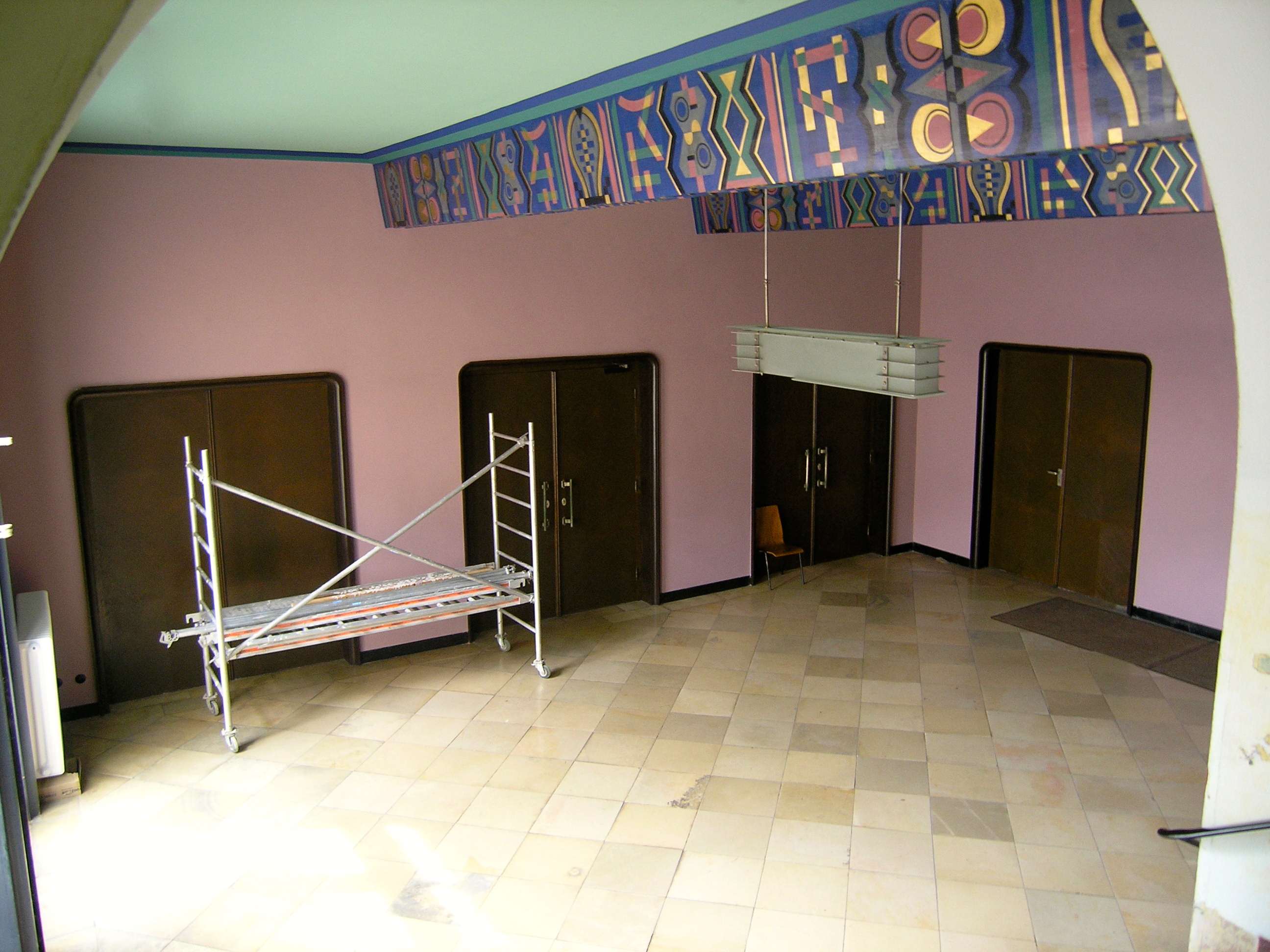 Vorraum der Aula des Gymnasium Wendalinum kurz nach Abschluss der Renovierungsarbeiten. Die Pfeiler des Durchgangs (ganz außen sichtbar) waren zum Aufnahmezeitpunkt noch nicht neu gestrichen.